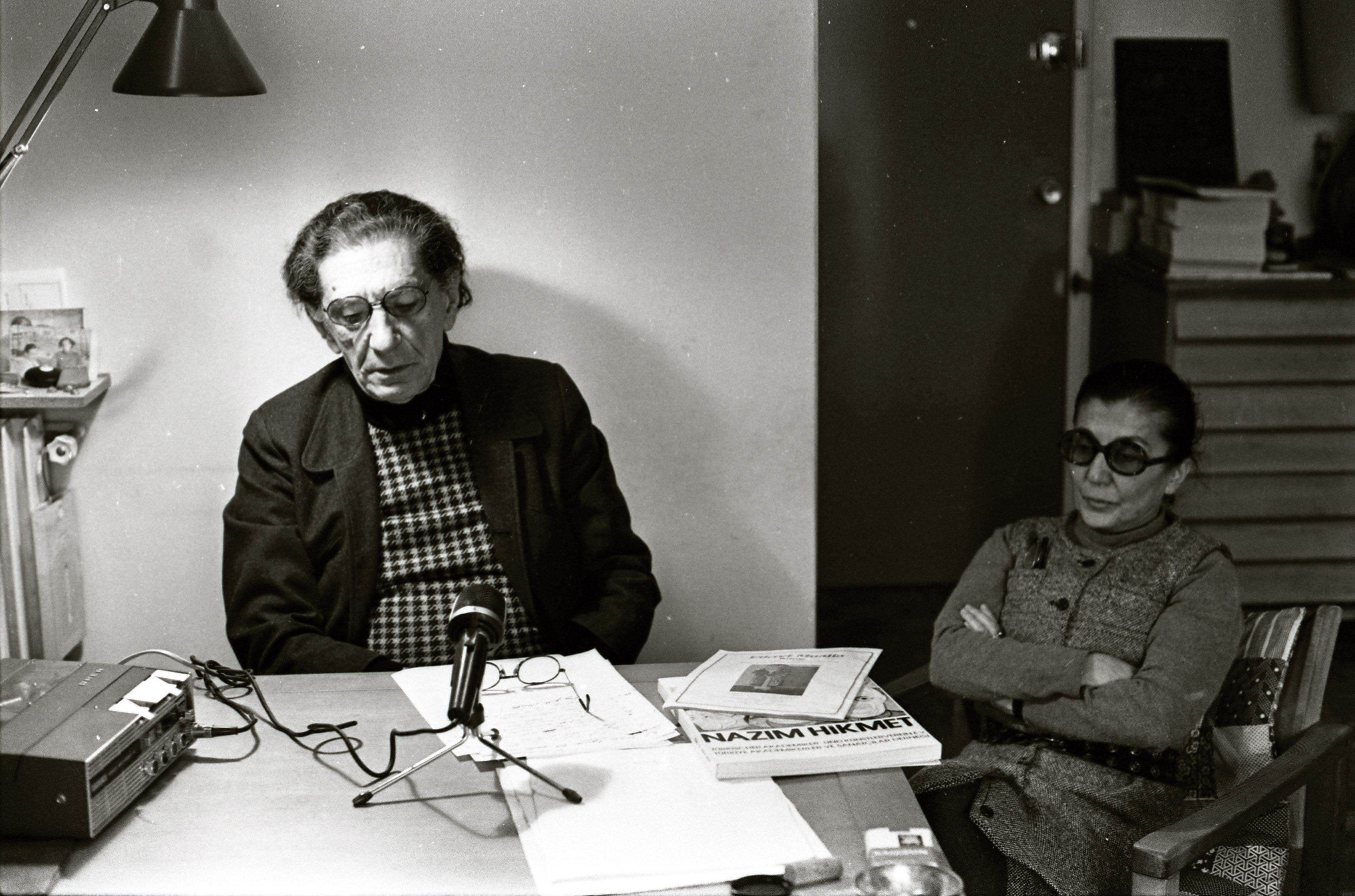 “Nâzım Hikmet gerçekten salgın boyutlara erişti. Bunu söylerken mutlaka satılmış bulunan kitap adedini kasdetmiyorum. Ama, Fransız gençliğinde bir Nâzım Hikmet tutkusu aldı yürüdü ki, şaşılacak kertelere ulaştı. Diyebilirim ki, iki üç ayda bir, genç bir grup bizlere başvurup, Nâzım’ın eski dostları olduğumuzu bildikleri için yardımcı olmamızı diliyorlar; Nâzım festivalleri, şiirleri, oyunları için.” Abidin Dino (Abdi İpekçi ile söyleşi, “Milliyet”, 27.02.1978) Abidin ve Güzin Dino, Paris (tarihi bilinmiyor) #SALTAraştırma, Yusuf Taktak Arşivi Repository: SALT Research Rights Info: This material can be used under Creative Commons Attribution-NonCommercial-NoDerivatives 4.0 International (CC BY-NC-ND 4.0) license.